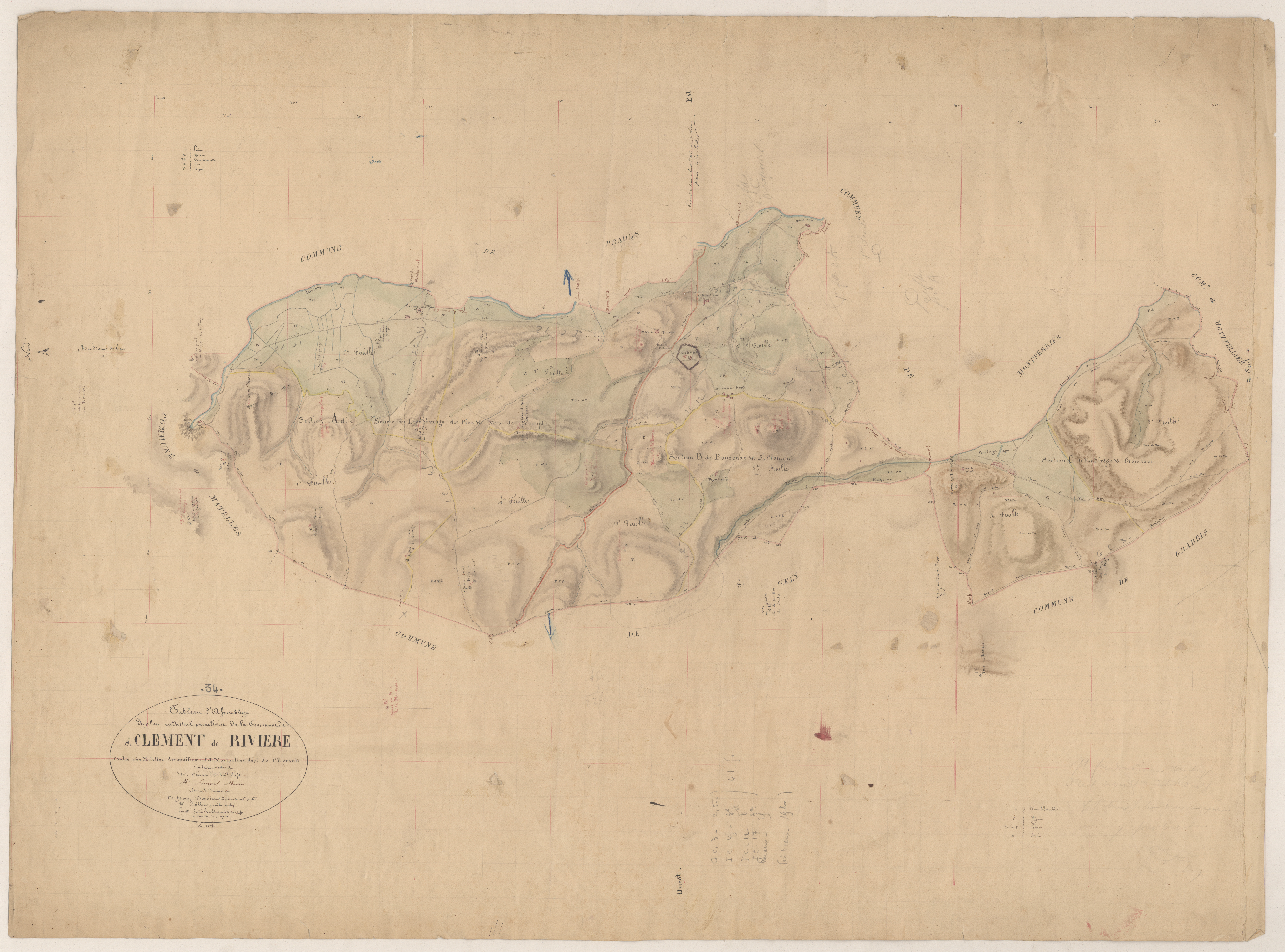 Saint-Clément-de-Rivière. - Cadastre napoléonien : tableau d'assemblage.